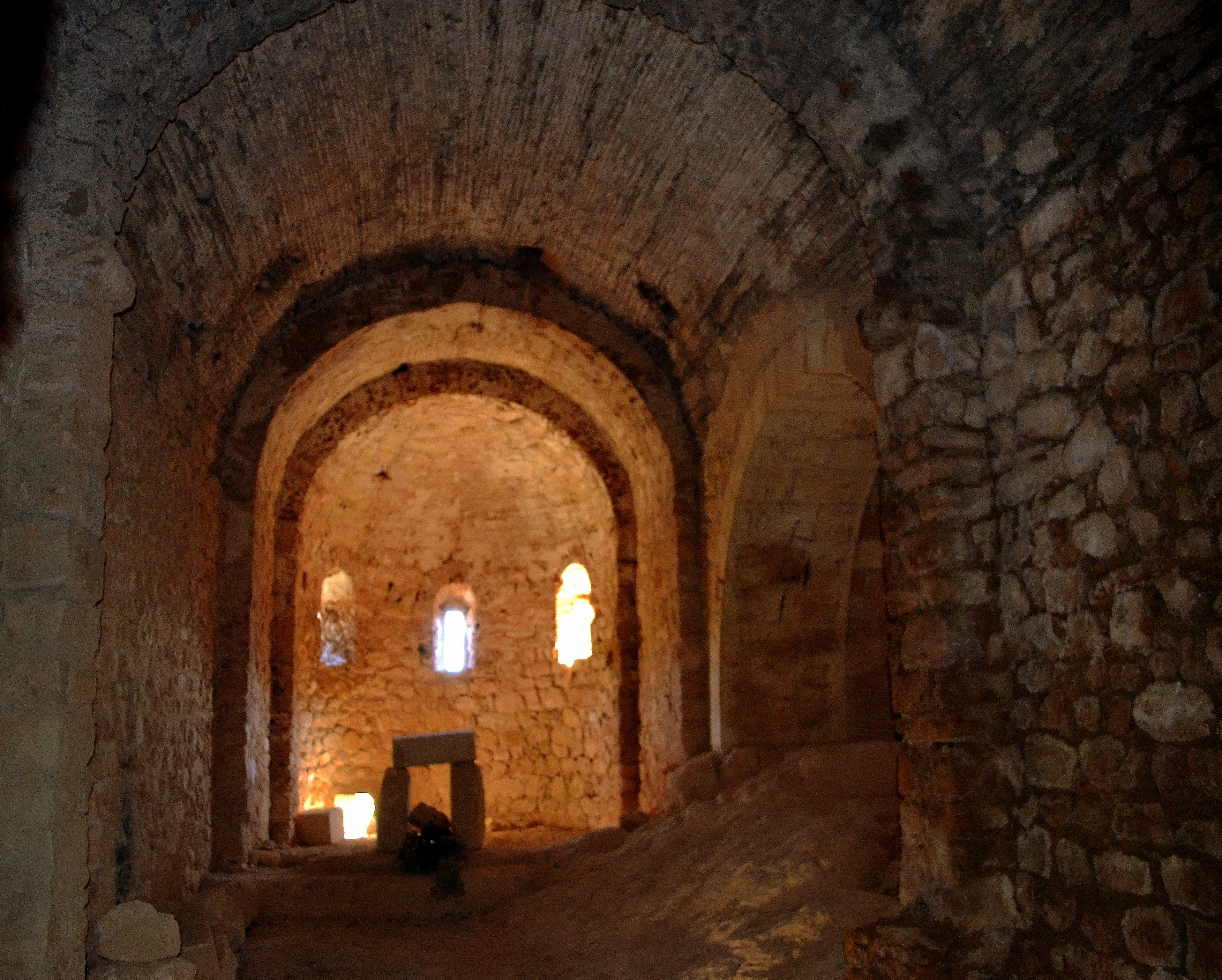 Església romànica de Sant Miquel del Montmell (el Montmell)